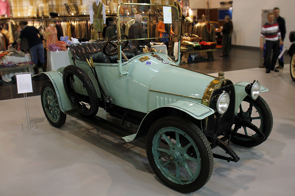 1912 Opel 5/12 PS "Huxel"_IMG_3129